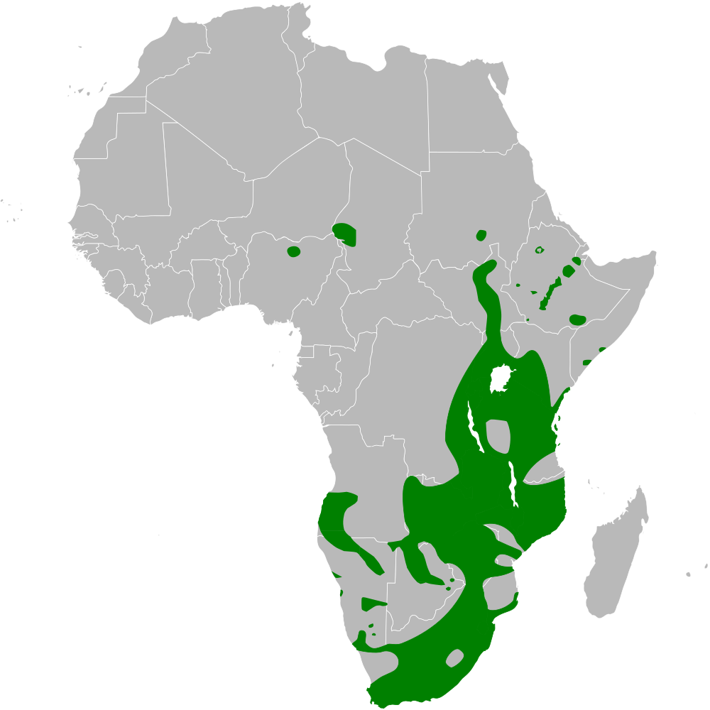 Acrocephalus gracilirostris distribution map, based on